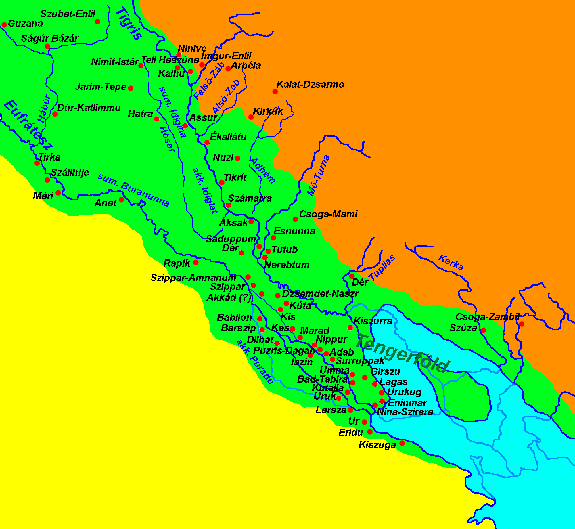 Mezopotámia térképe a sumerkorban